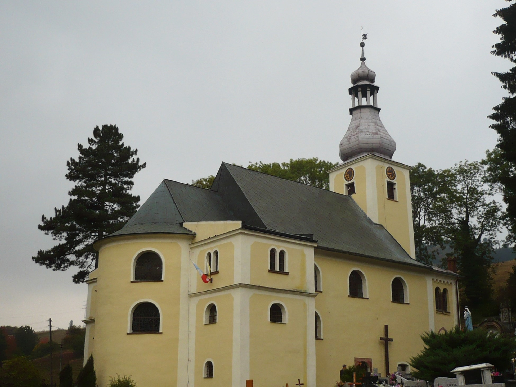 Ludwikowice Kłodzkie. Kościół pw. św. Michała Archanioła